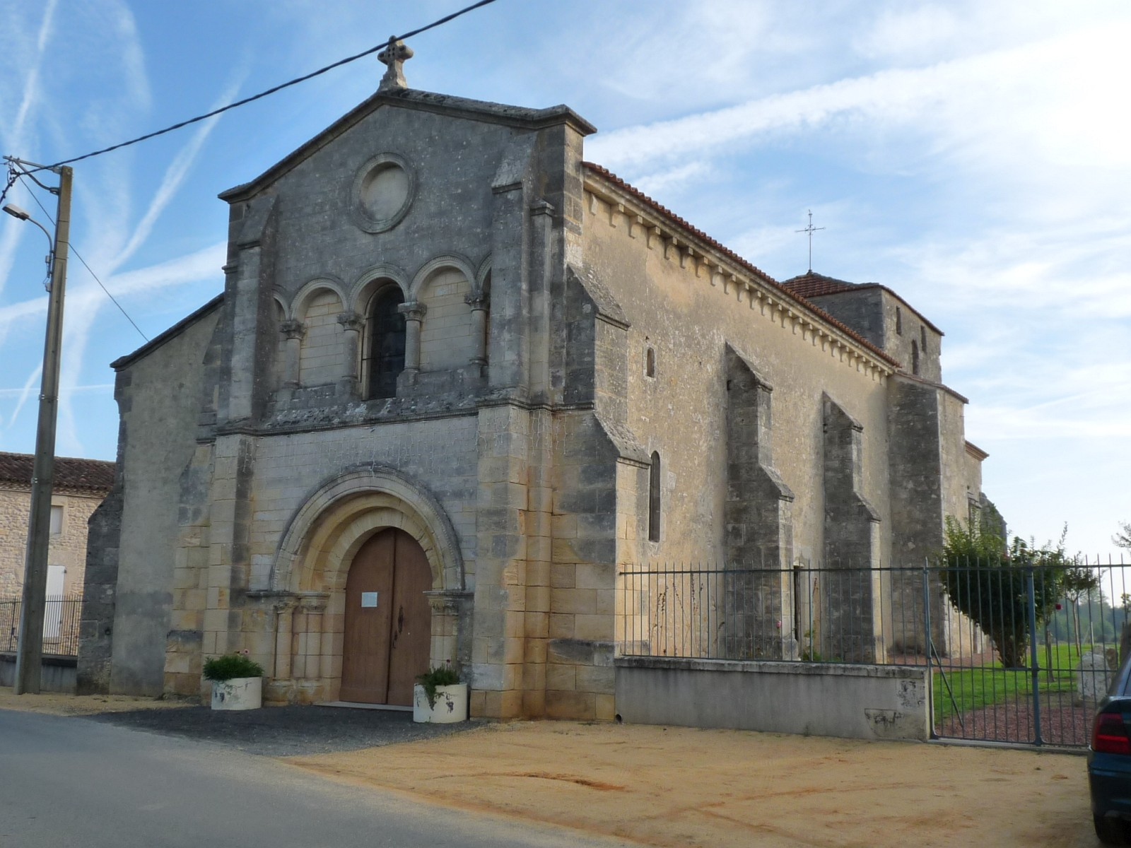 Eglise de Campugnan, Gironde, France